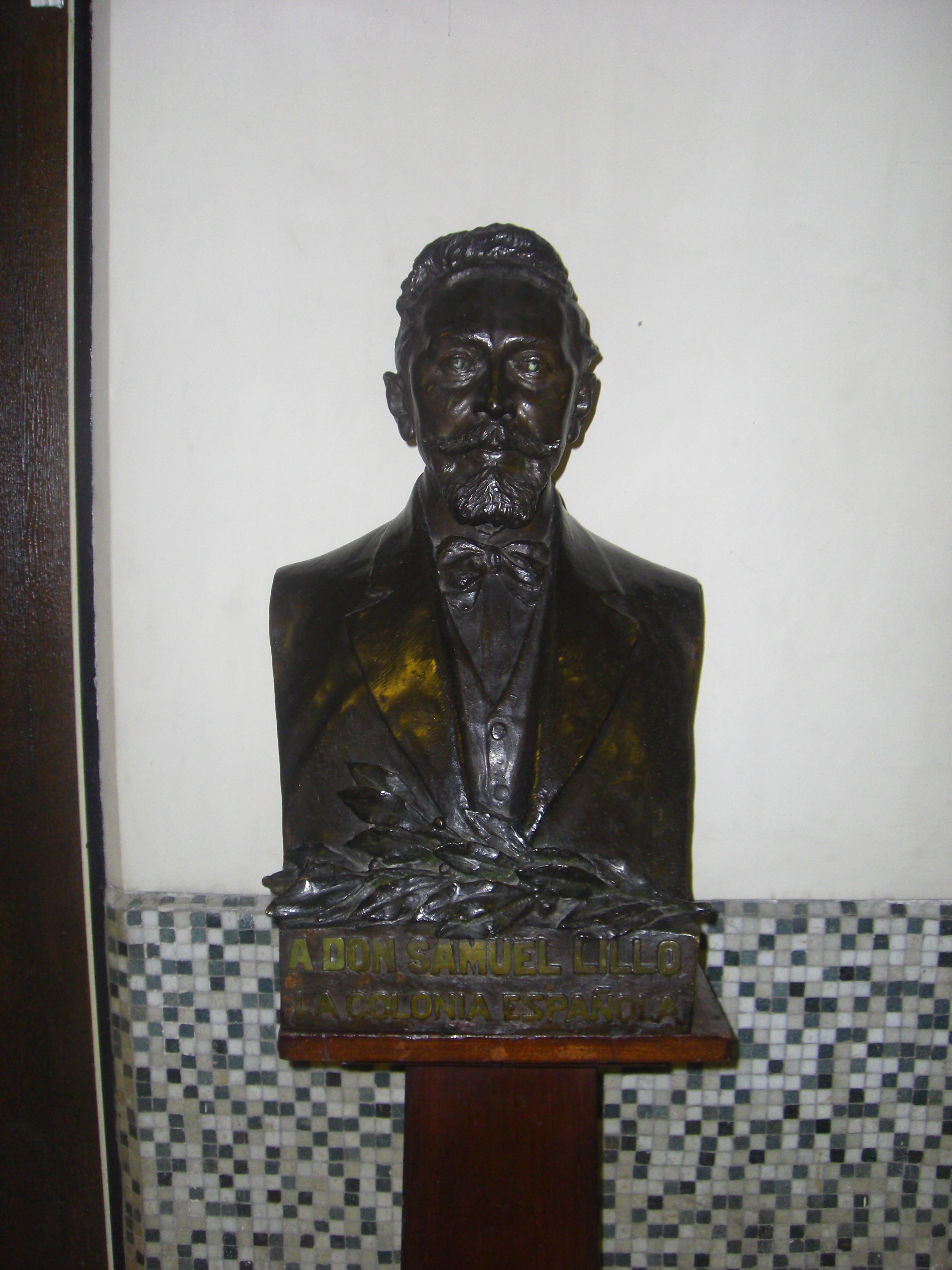 Busto de don Samuel Lillo ubicado en el Instituto Nacional.